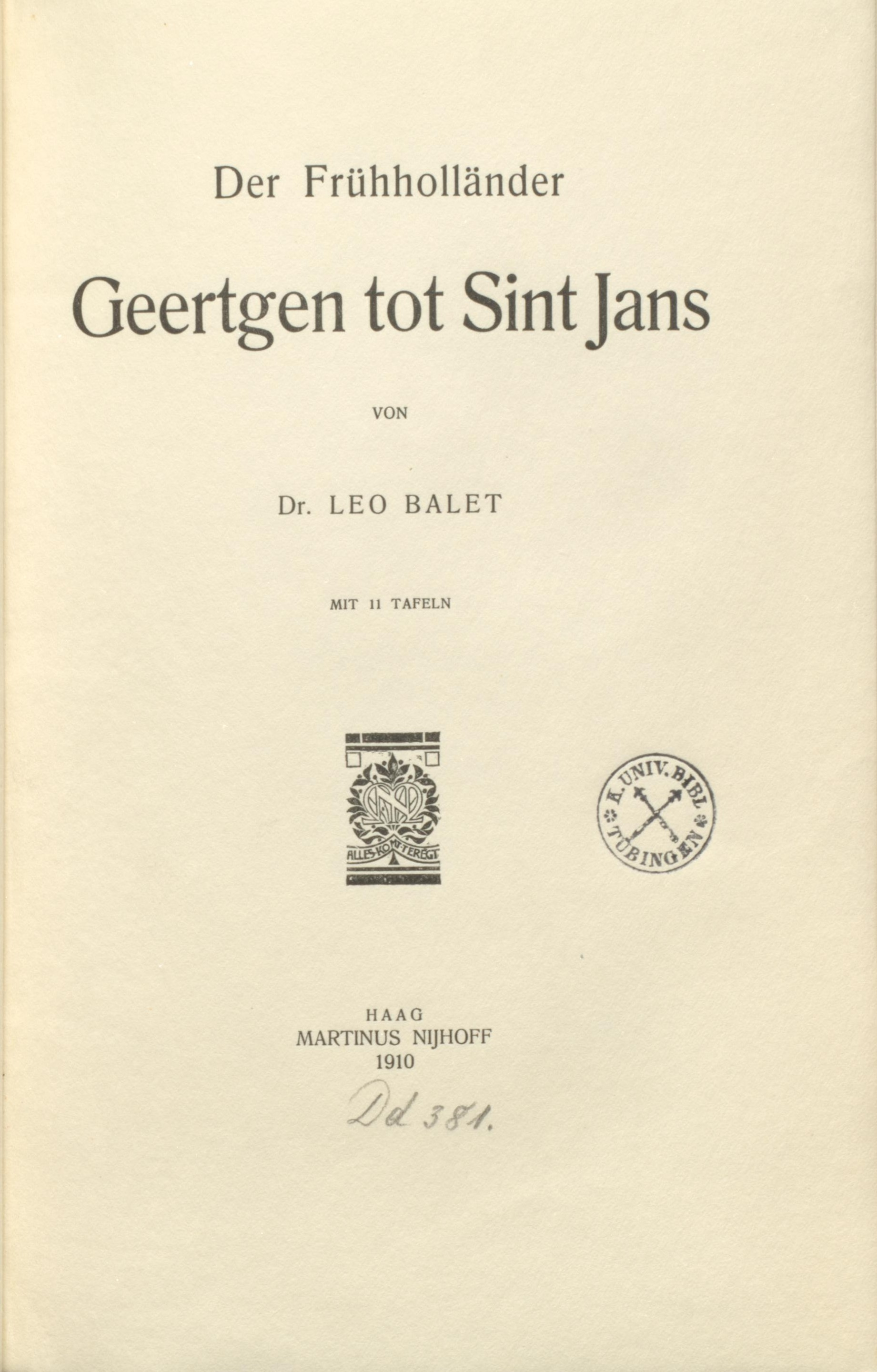 Leo Balet Der Frühholländer Geertgen tot Sint Jans. Den Haag : M. Nijhoff, 1910